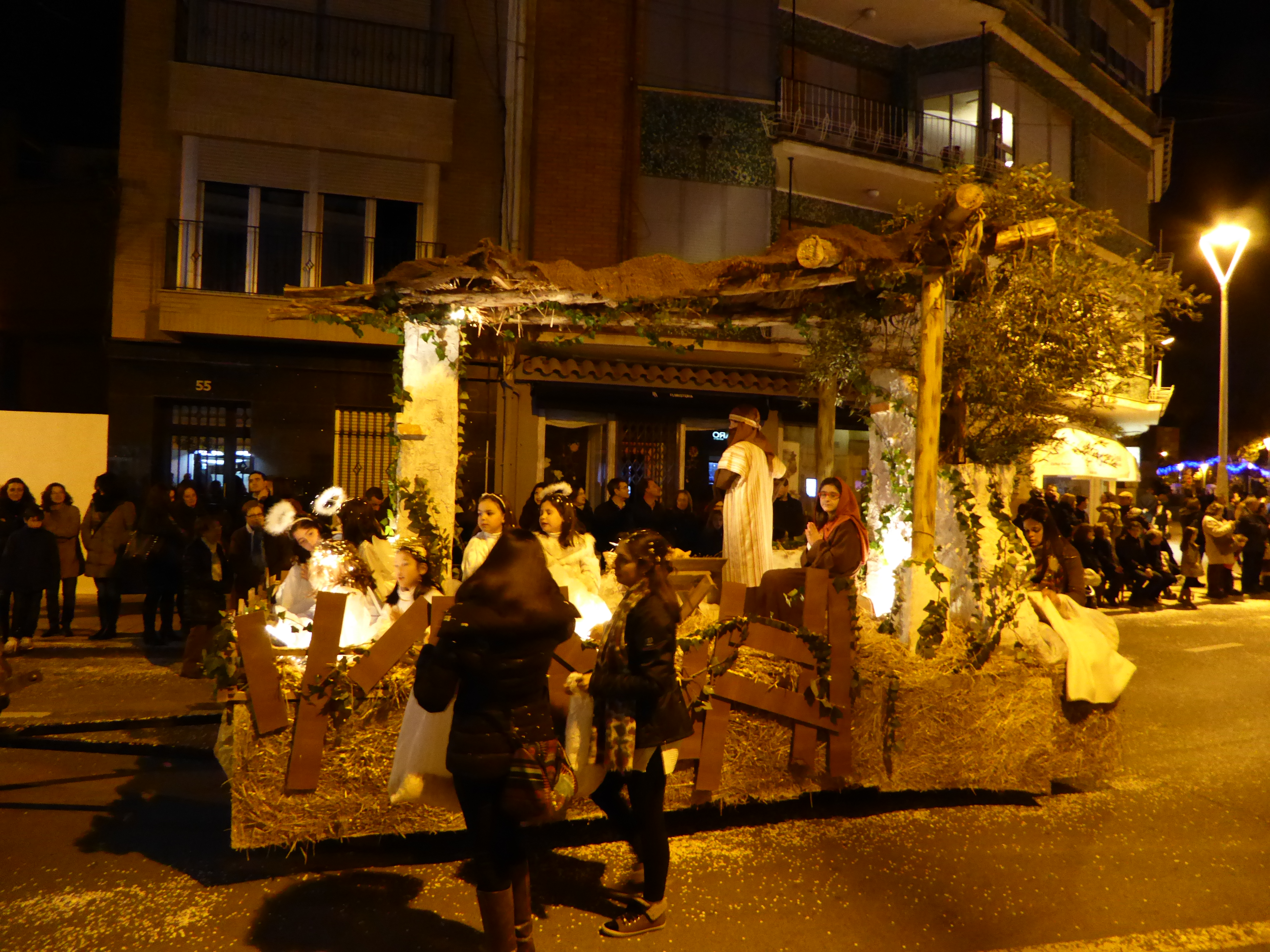 Fiestas de Reyes This is a photography of a Folklore festival in Spain (Wikidata id Q23663100).